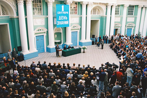 МОСКВА. Встреча со студентами и преподавателями Московского педагогического государственного университета.